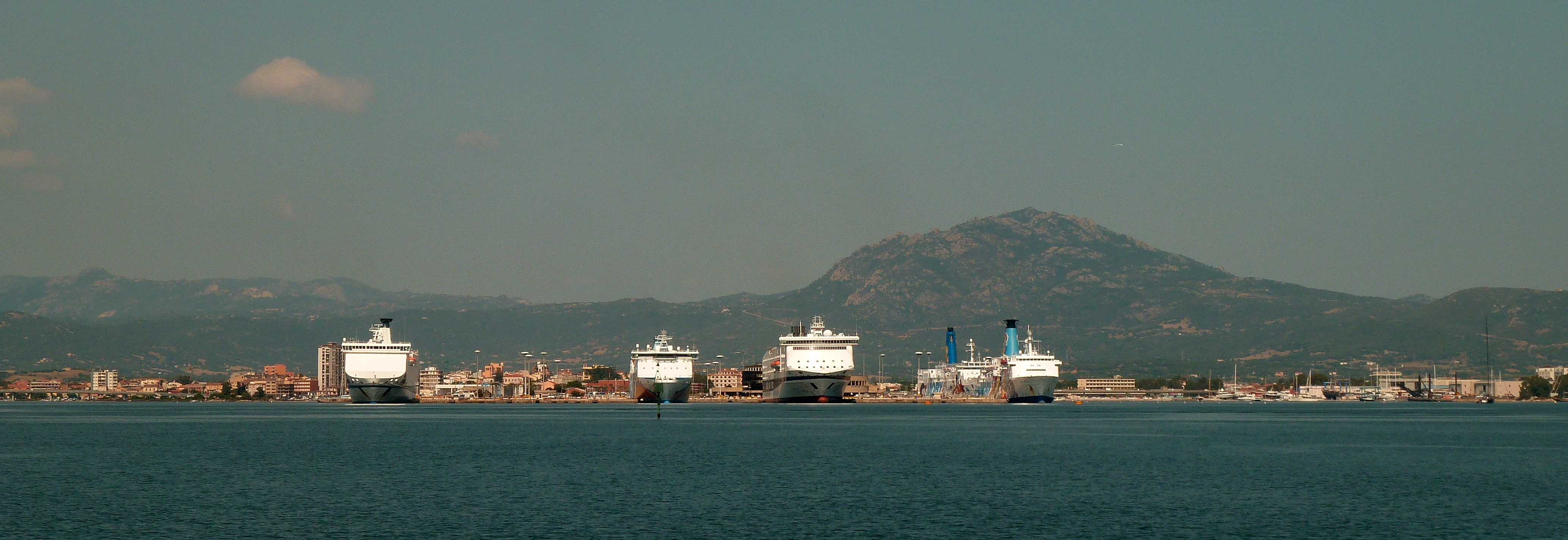 Vista del porto di Olbia, Sardegna, Italia.